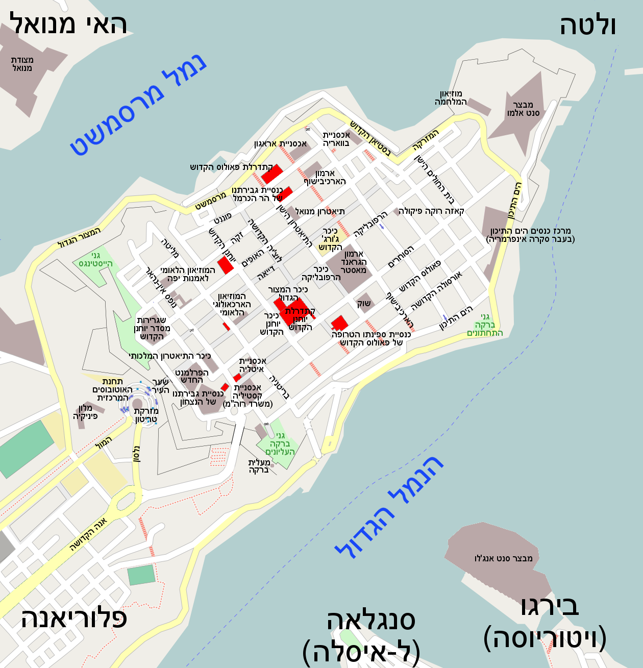 Valeta